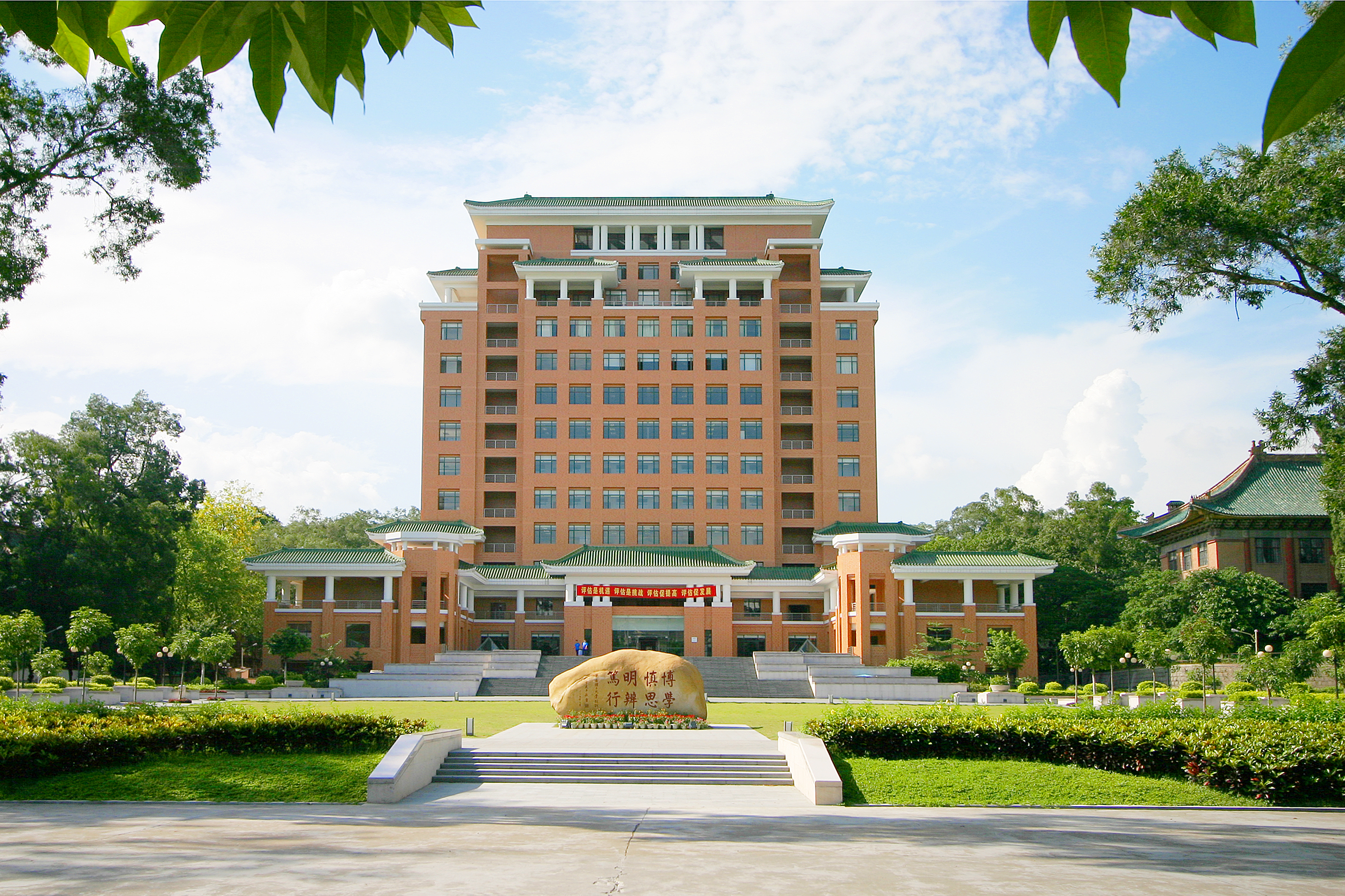 广州华南理工大学励吾科技楼